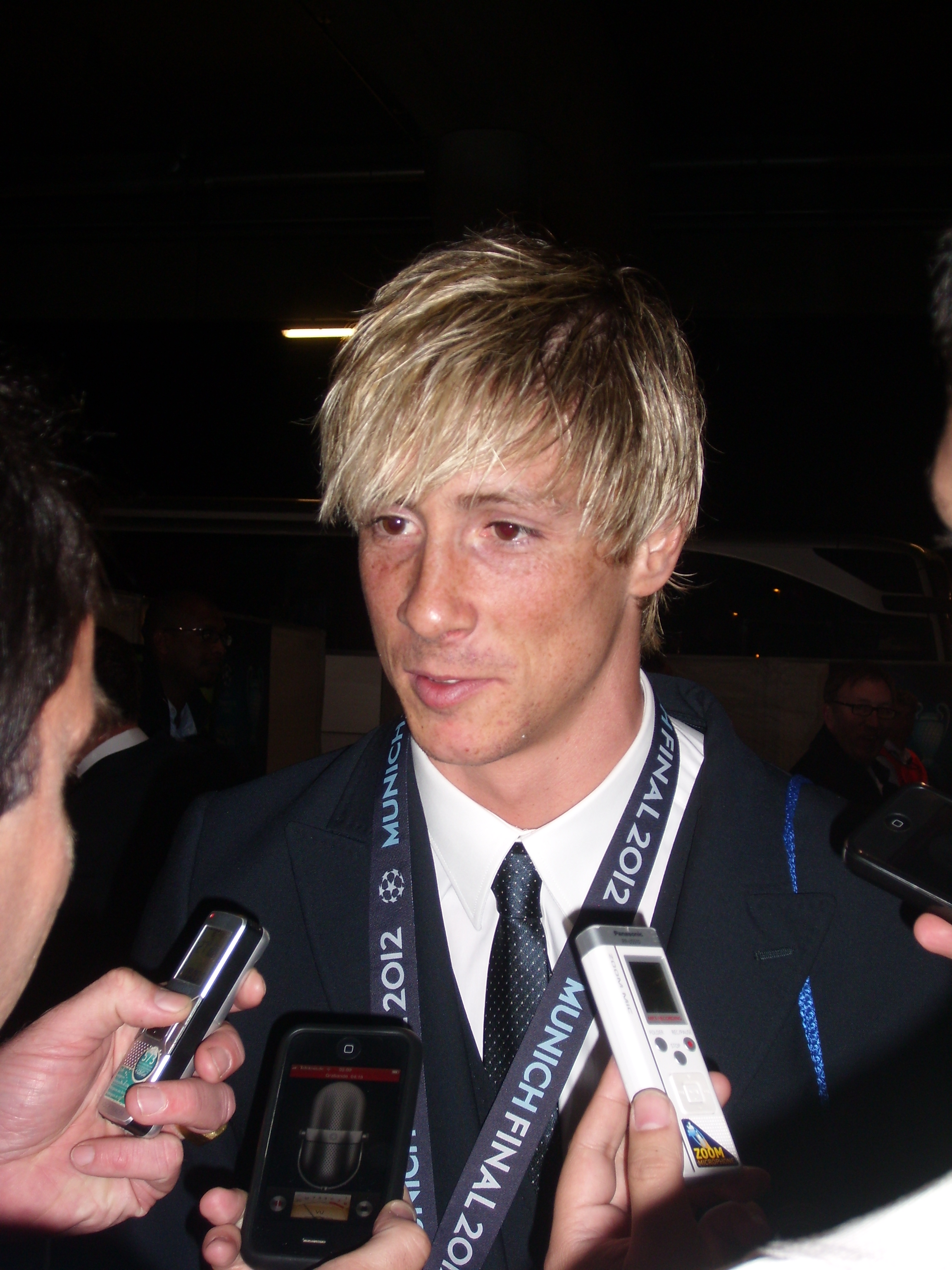 Fernando Torres nach dem Munich Final 2012